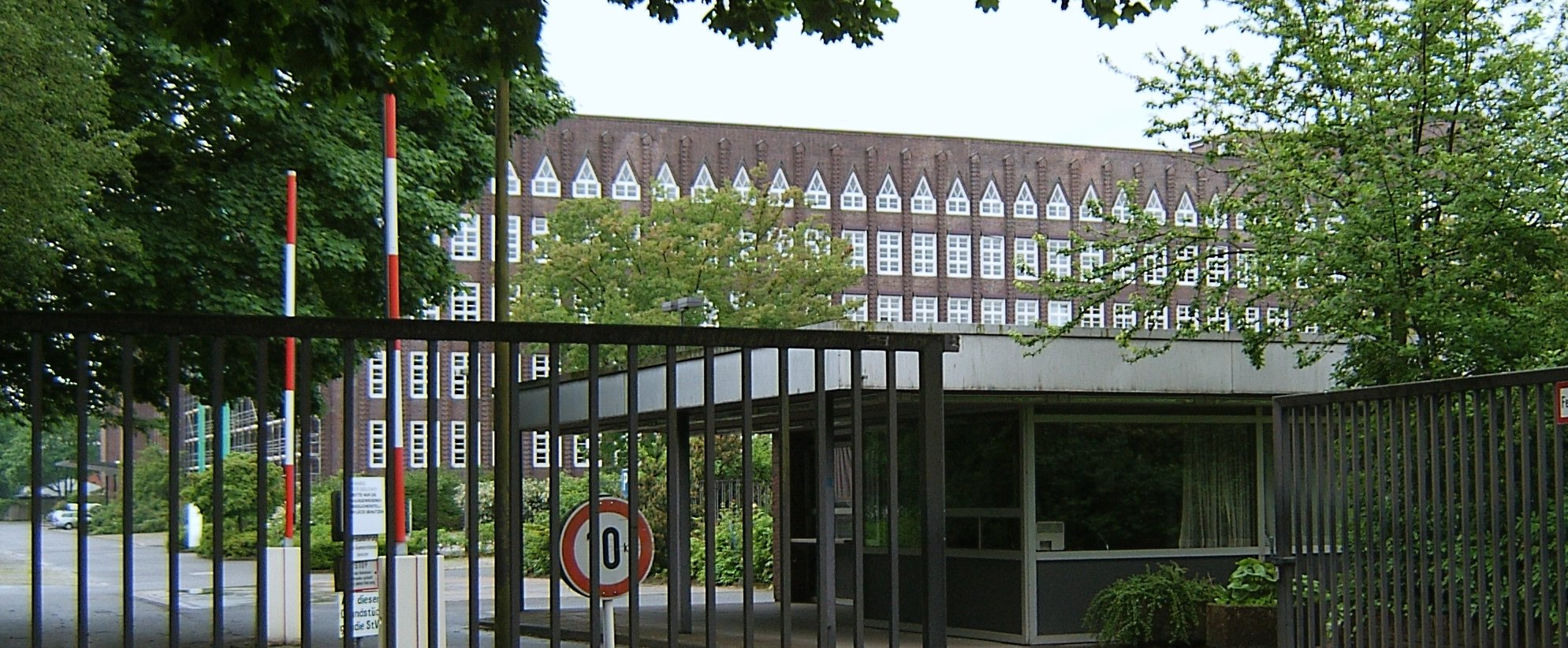 Hamburg, Wandsbek, Hinschenfelde, ehemalige Zigarrettenfabrik